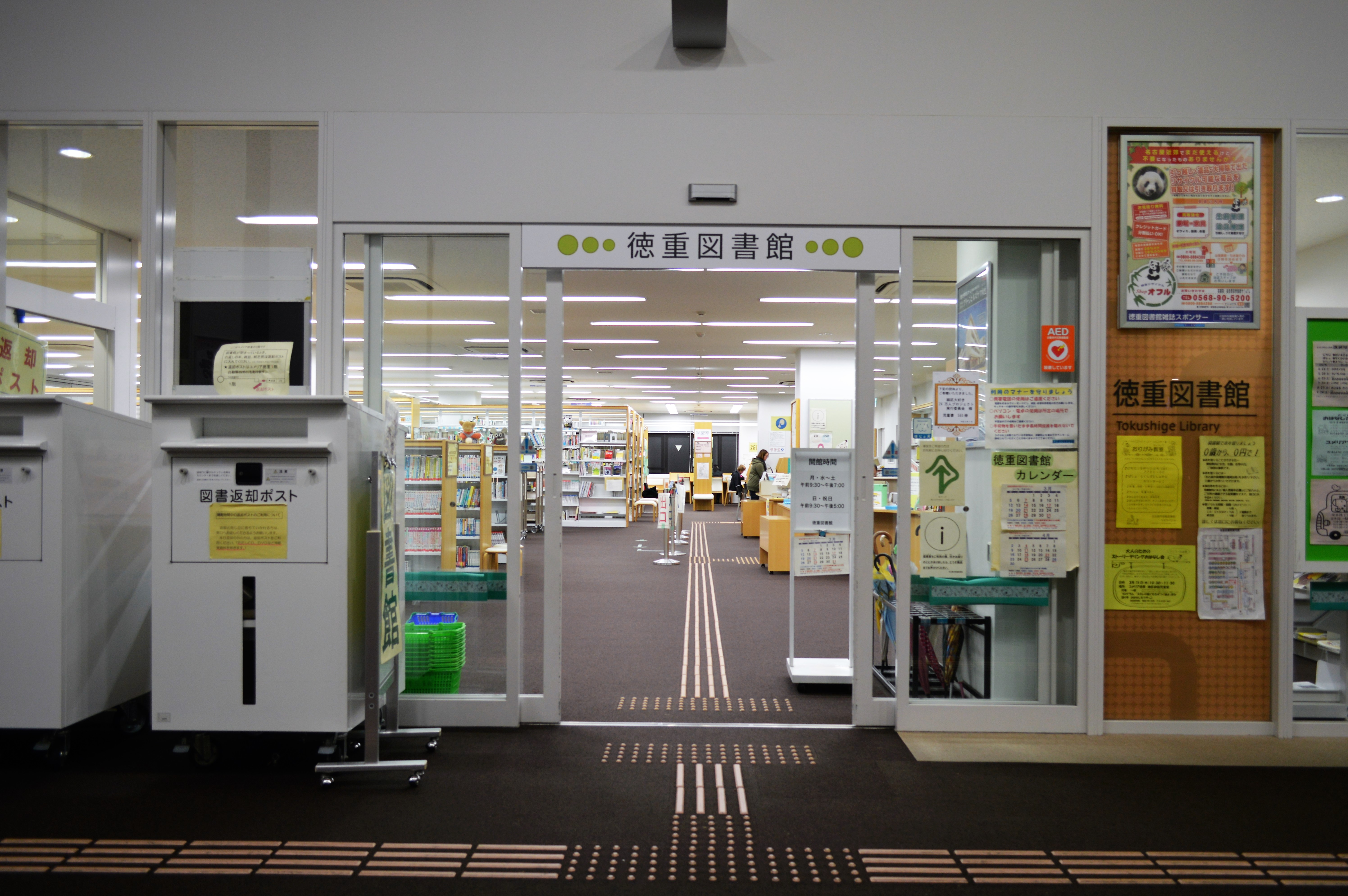 名古屋市緑区のユメリア徳重にある名古屋市徳重図書館。入口左側に図書返却ポスト。